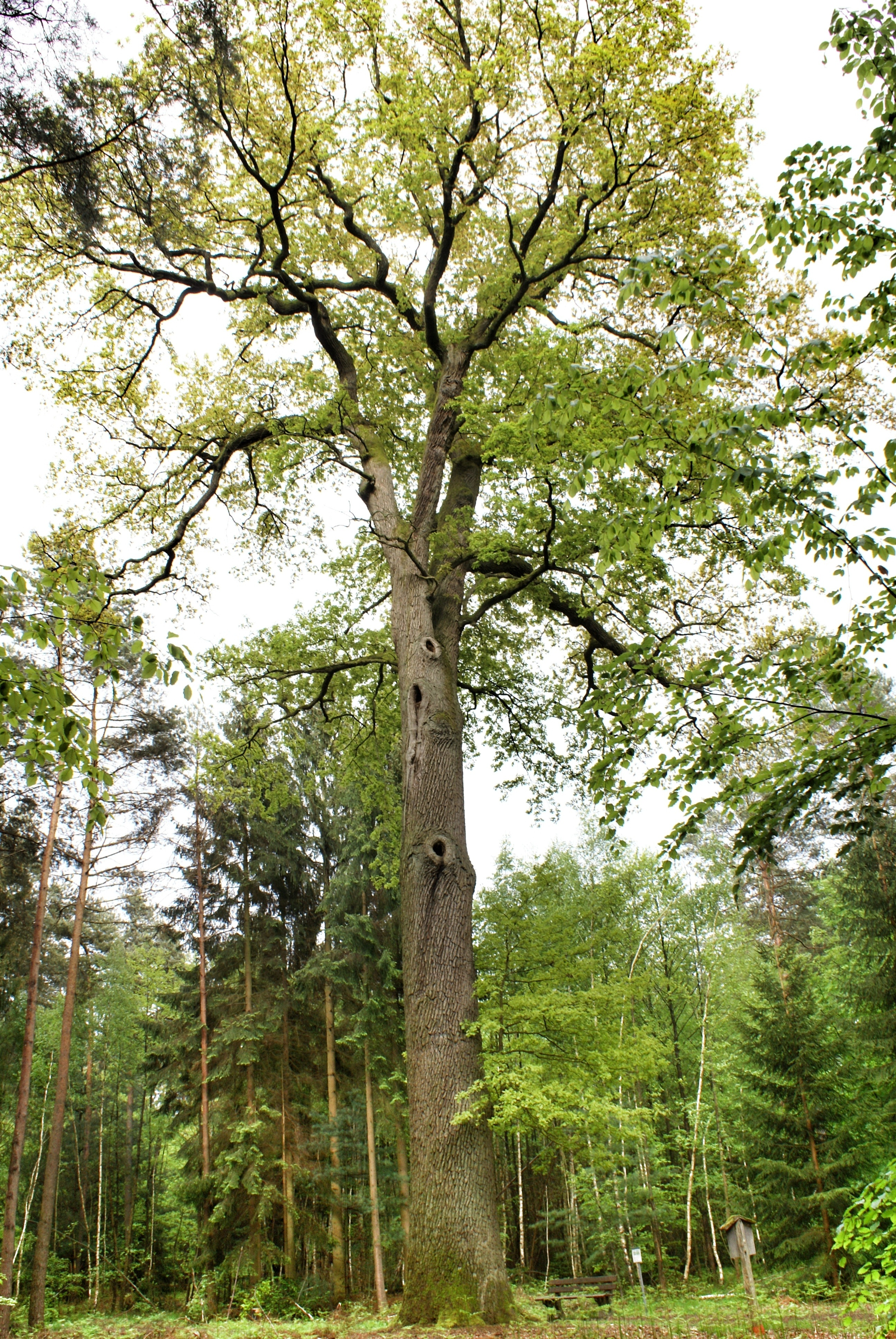 Bismarck Eiche im Bienwald in der Nähe von Schaidt